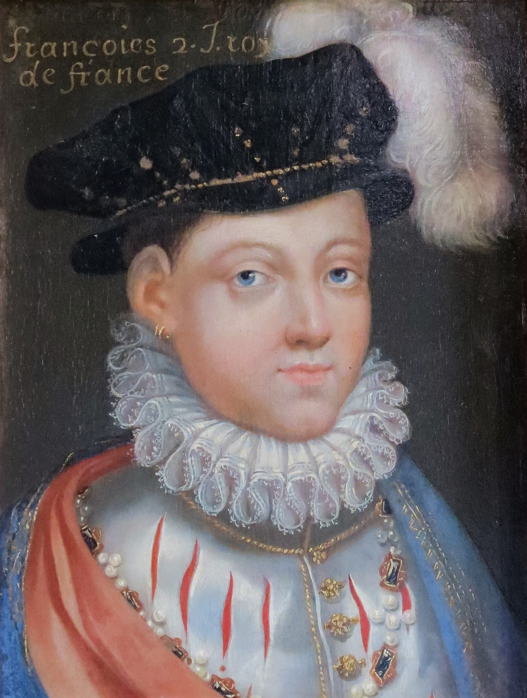 Tableau provenant de la galerie de portraits de la Chartreuse du Liget représentant François II, roi de France, huile sur toile du XVIIe d'un artiste anonyme.